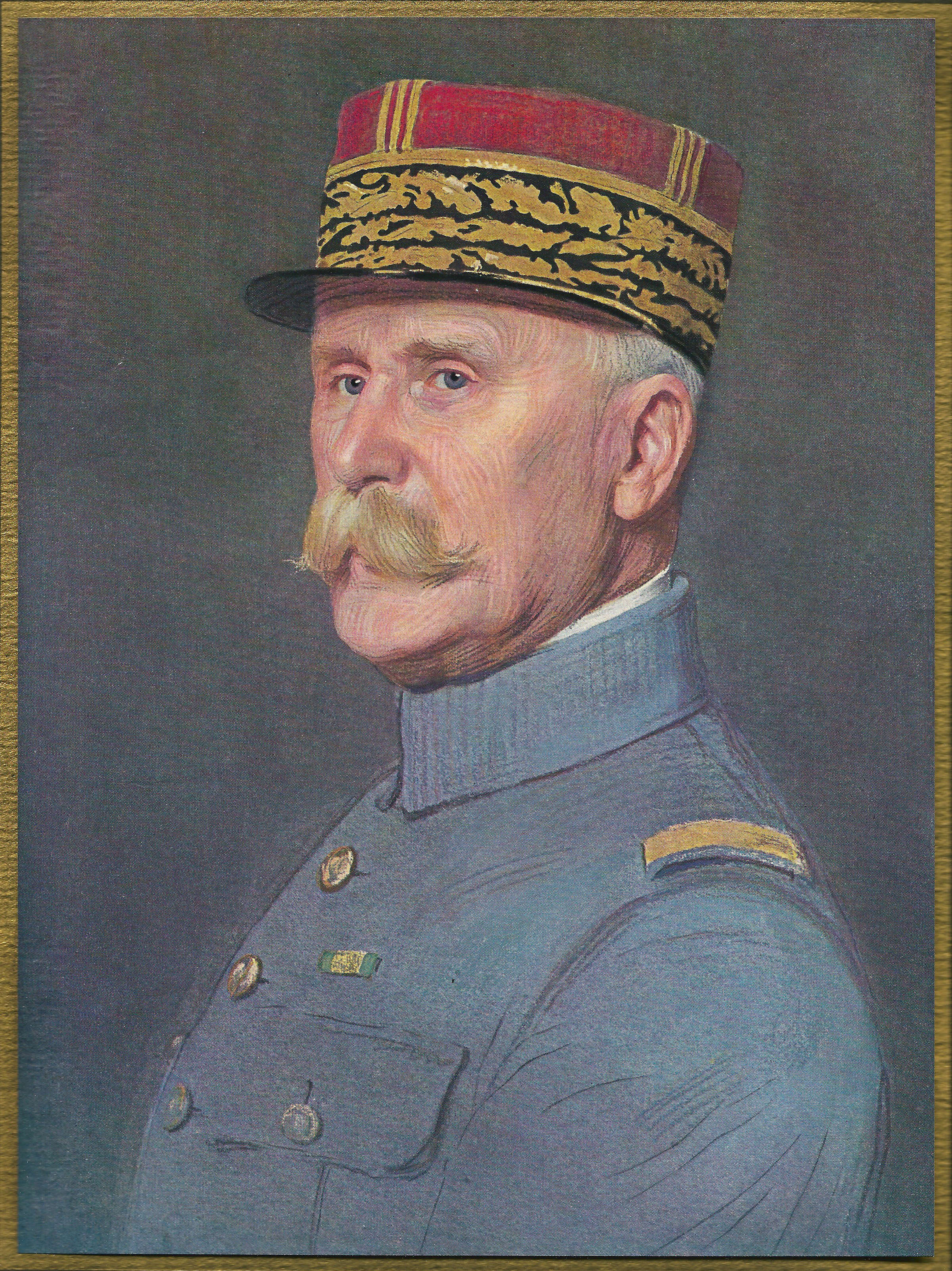 Portrait de Philippe Pétain (1856-1951)